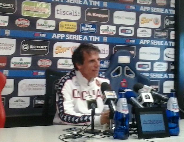 Gianfranco Zola in conferenza stampa il 10 gennaio 2015 ad Assemini Licensing 2015